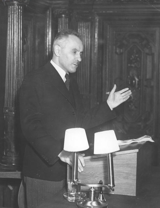 Edward Lipiński – ekonomista, profesor Szkoły Głównej Handlowej, dyrektor Instytutu Badań Koniunktur Gospodarczych i Cen.